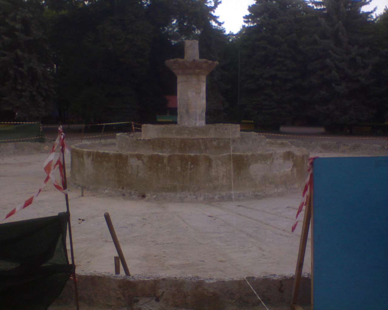 Реконструкція фонтану у Центральному парку, Вінниця 2013